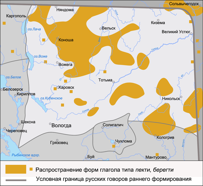 Карта распространения форм глагола типа пекти, берегти на территории Вологодской группы говоров. Источник: Захарова К. Ф., Орлова В. Г., Сологуб А. И., Строганова Т. Ю. Образование севернорусского наречия и среднерусских говоров / ответственный редактор В. Г. Орлова. — М.: Наука, 1970. — С. 279 (карта 83).